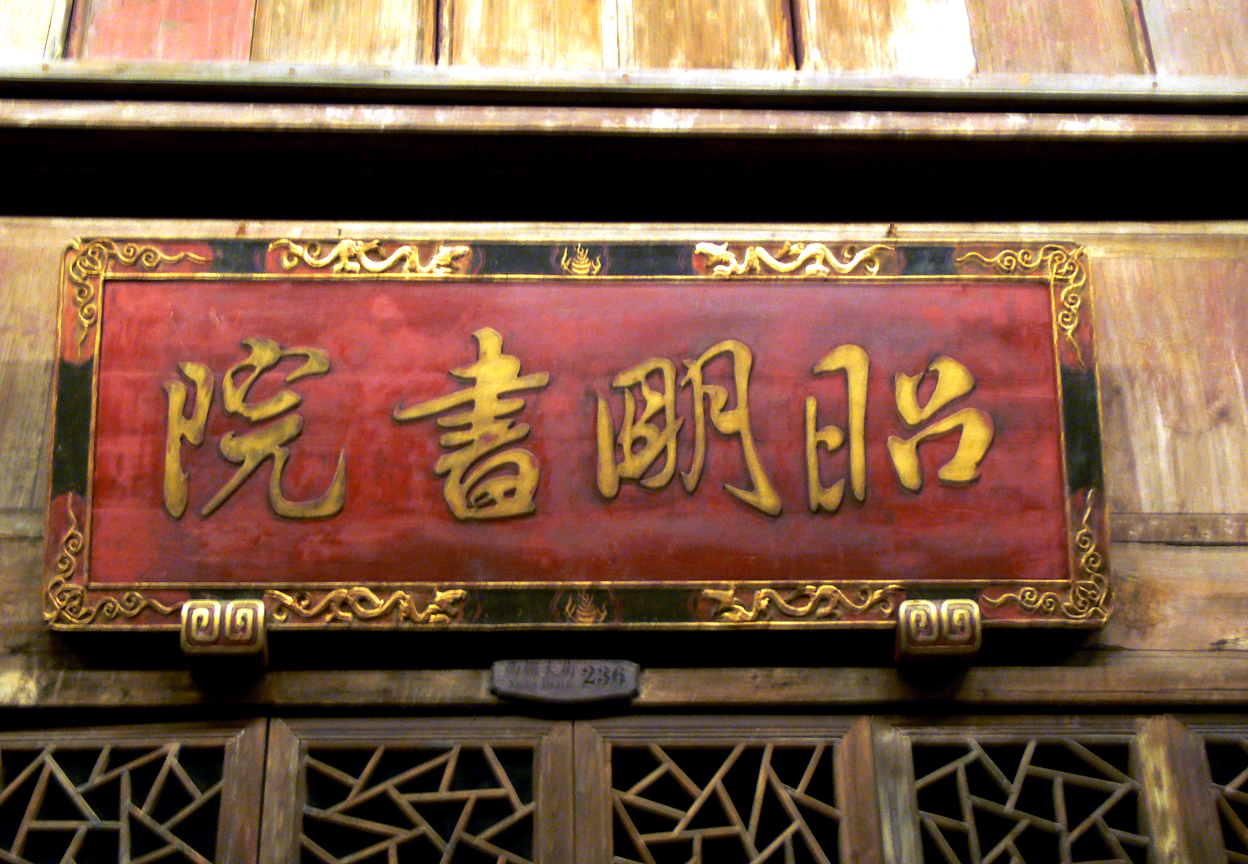 浙江桐乡乌镇昭明书院